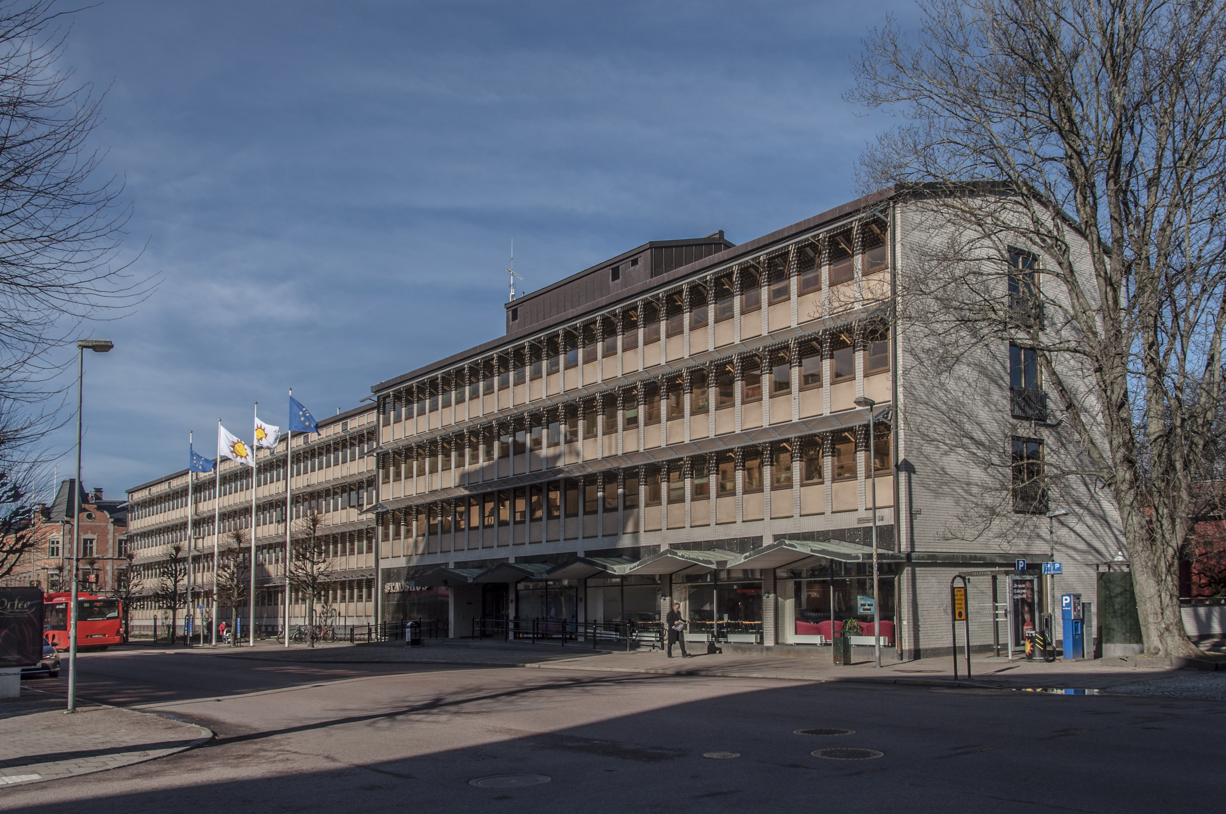 Stadshuset i Karlstad. Byggnadsår 1962. Arkitekt Per Lagergren